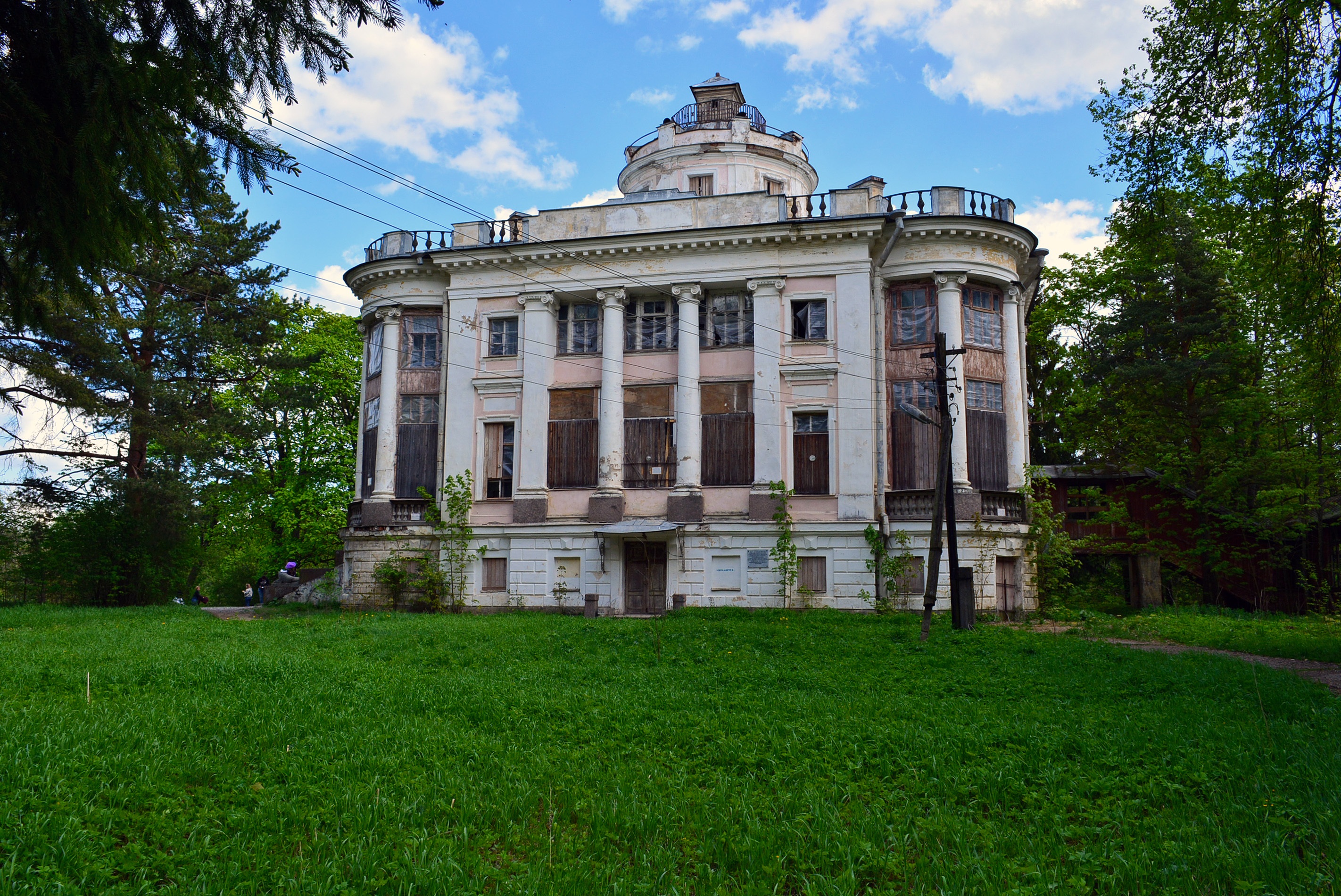 Дом господский (усадебный дом Демидова): Тайцы, Гатчинский район, Ленинградская область